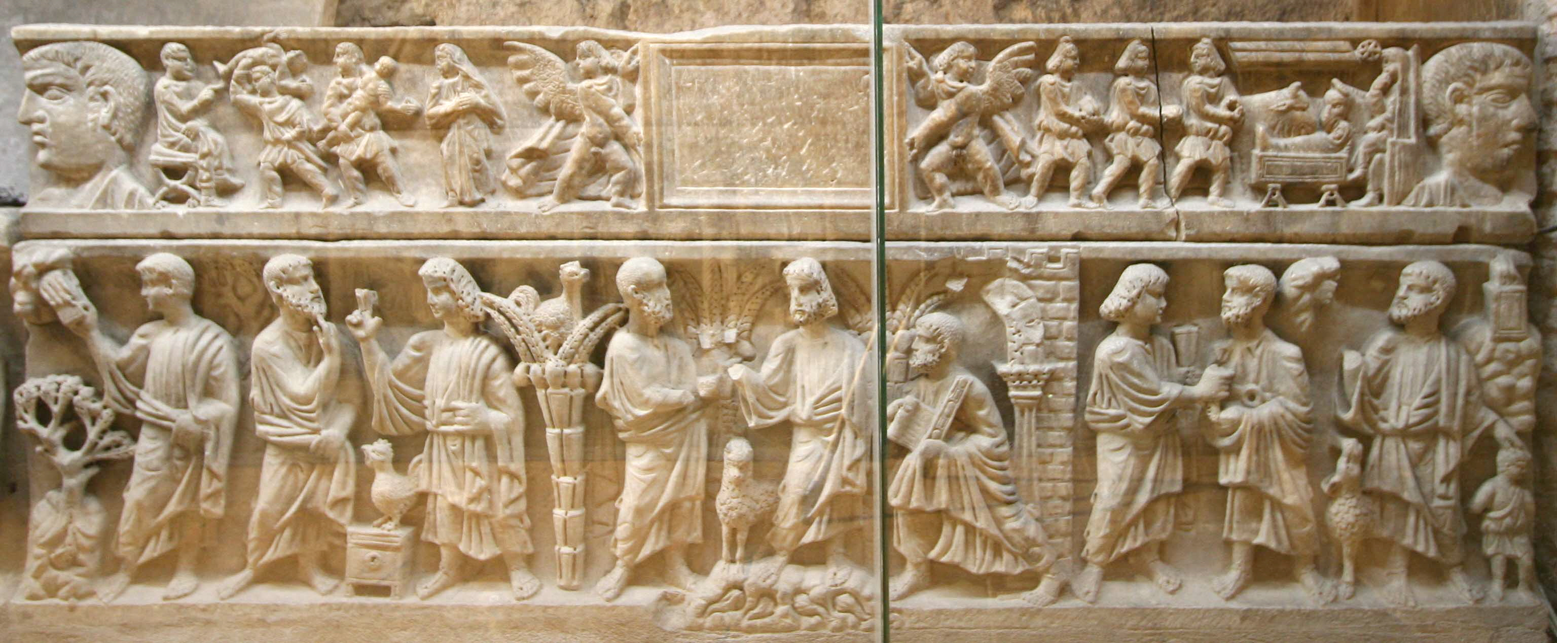 Basilique de Saint-Maximin (département du Var). Sarcophage paléochrétien dit "des Saints Innocents" et à tort "de Saint Maximin" (fin IV°-début V° siècle] se trouvant dans la crypte de l'église.